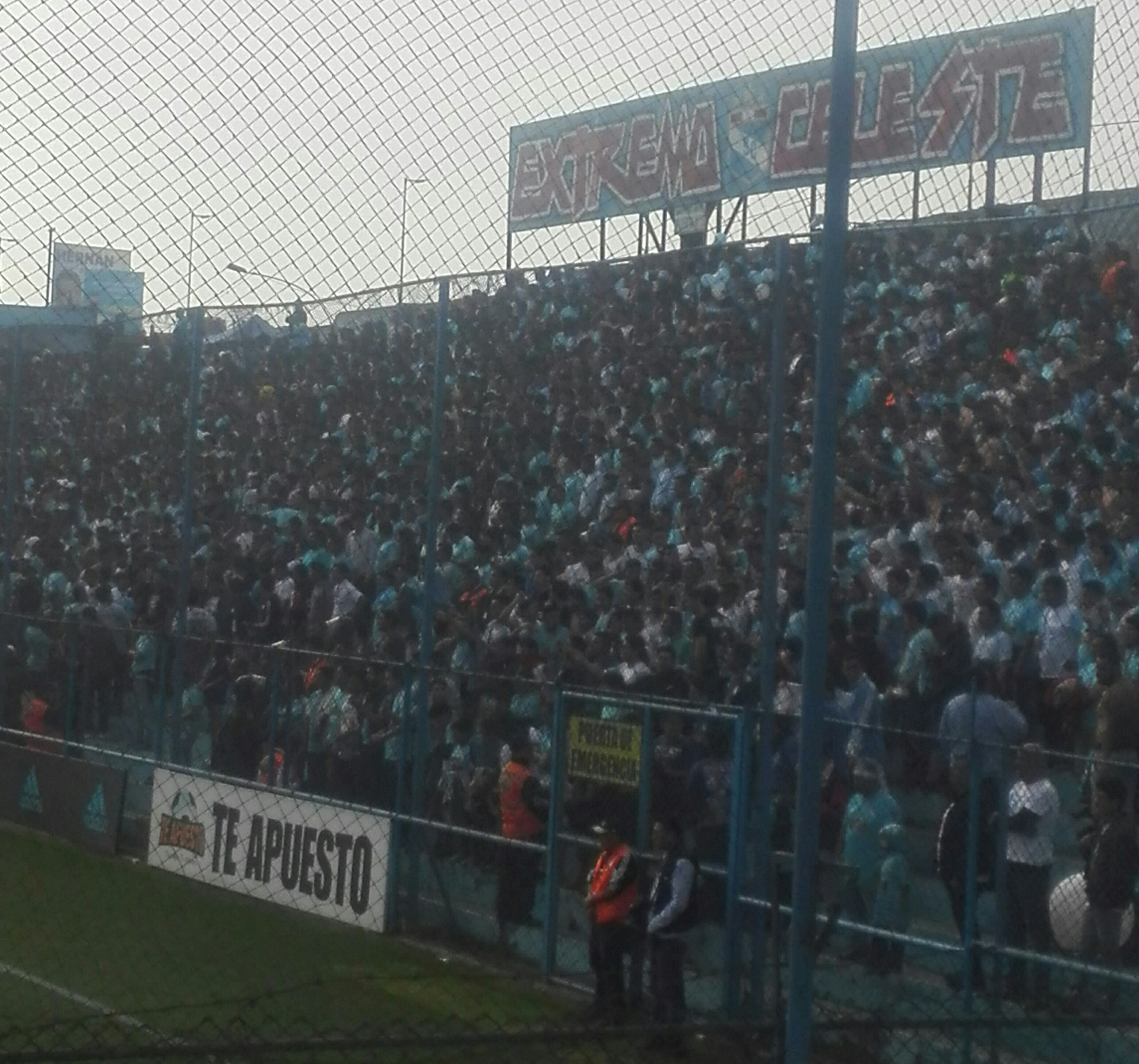 Foto de la barra del Club Sporting Cristal el Extremo Celeste en el partido contra Sport Rosario el día 26 de agosto de 2018